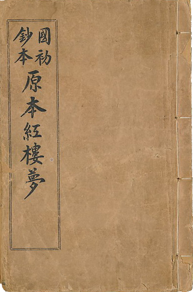 有正本封面